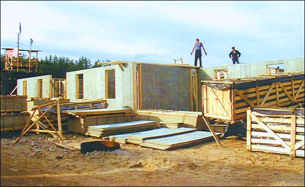 Возведение деревянных домов каркасно-панельной конструкции в г. Ленске (Якутия), пострадавшем от серьезного наводнения. Дома произведены и собирались силами сотрудников Сокольского ДОКа. Ленск, 2001 г.